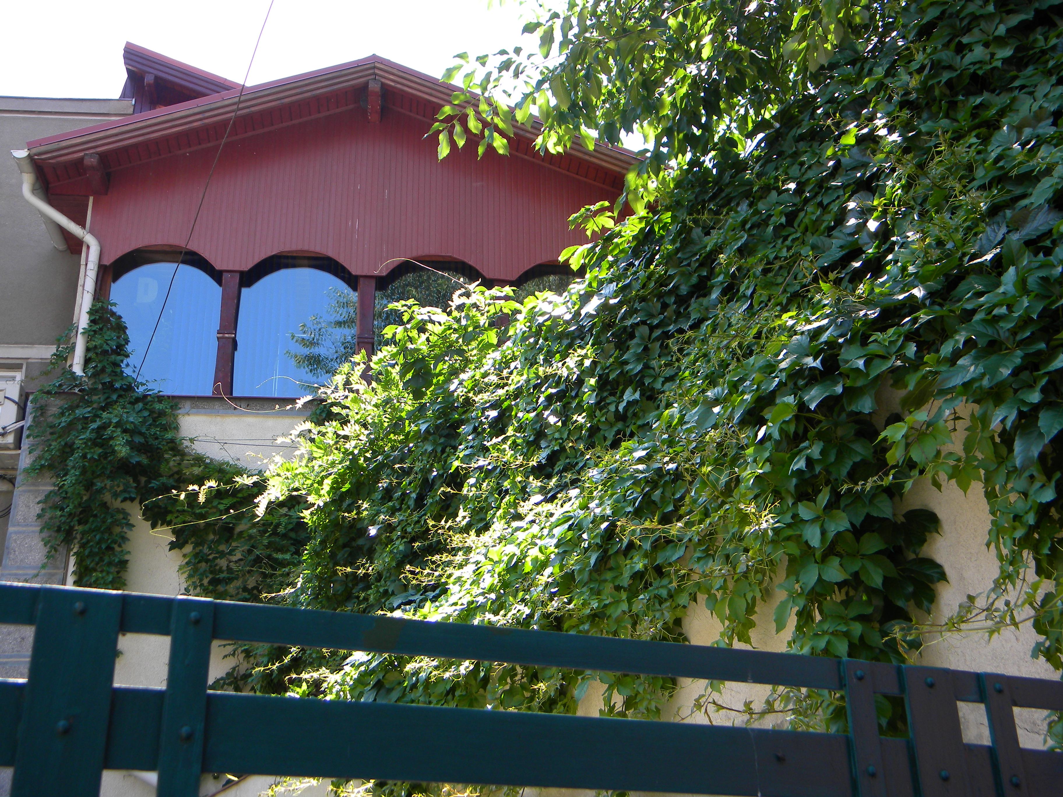 Bucuresti, Romania, Str. Caimatei nr. 2, sect. 2, B-II-m-B-18266